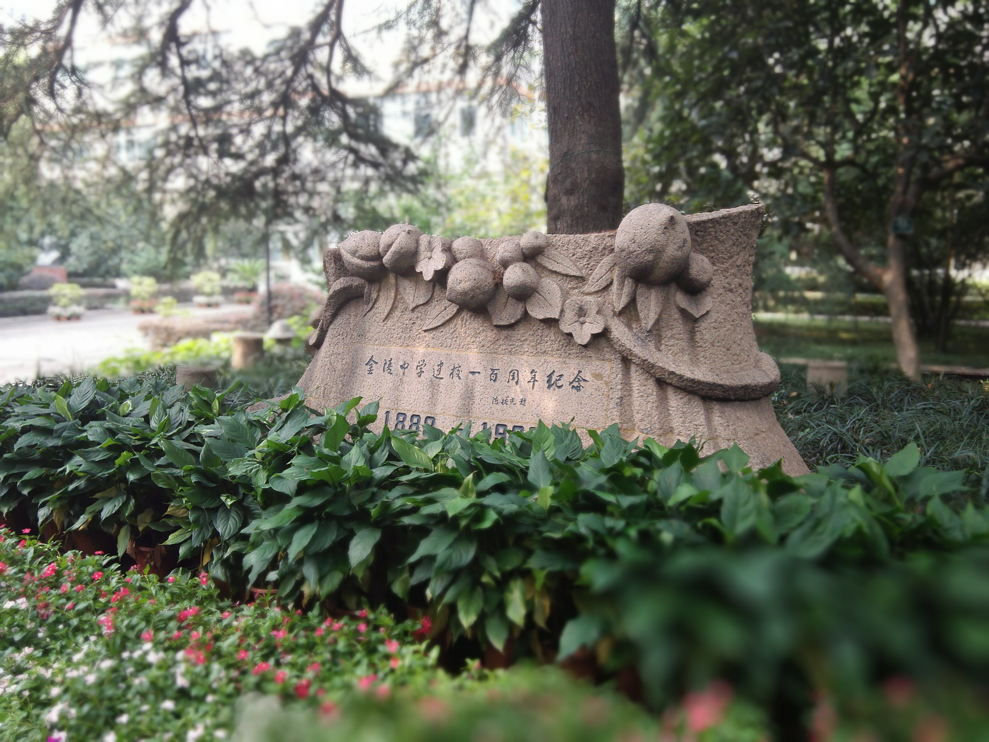 金陵中学建校一百周年纪念碑，陈裕光题。